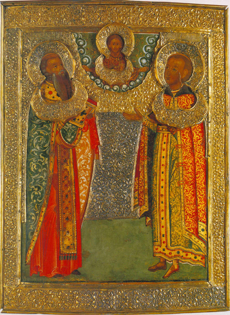 Священномученик Василий Анкирский и царевич Василий Михайлович Первая половина XVII в. Москва.